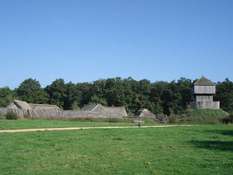 Le château à motte de Saint-Sylvain-d'Anjou dans le Maine-et-Loire, France.